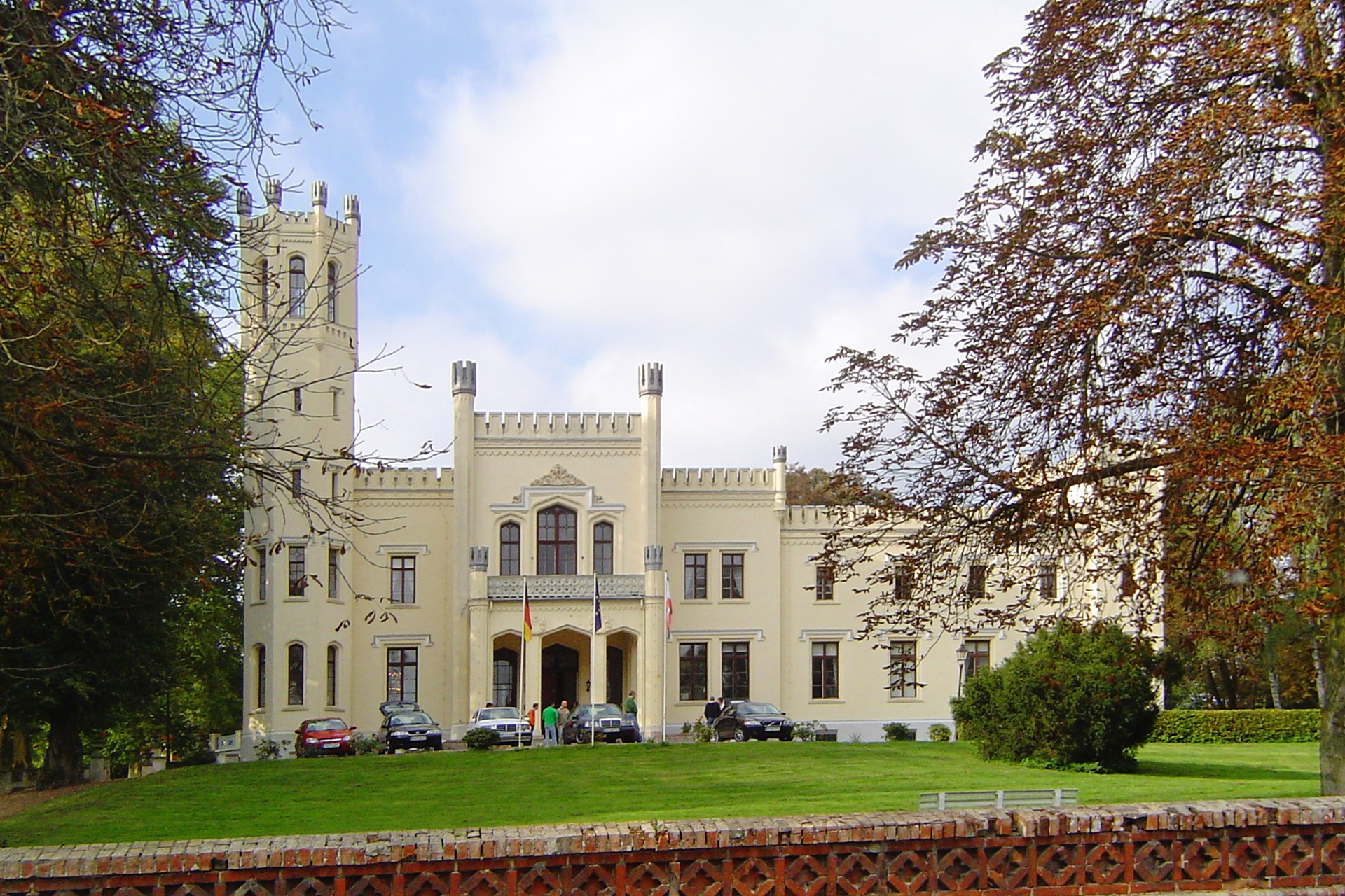 Schloss Kittendorf, im Landkreis Demmin, Mecklenburg-Vorpommern. (Nach Plänen von Friedrich Hitzig)